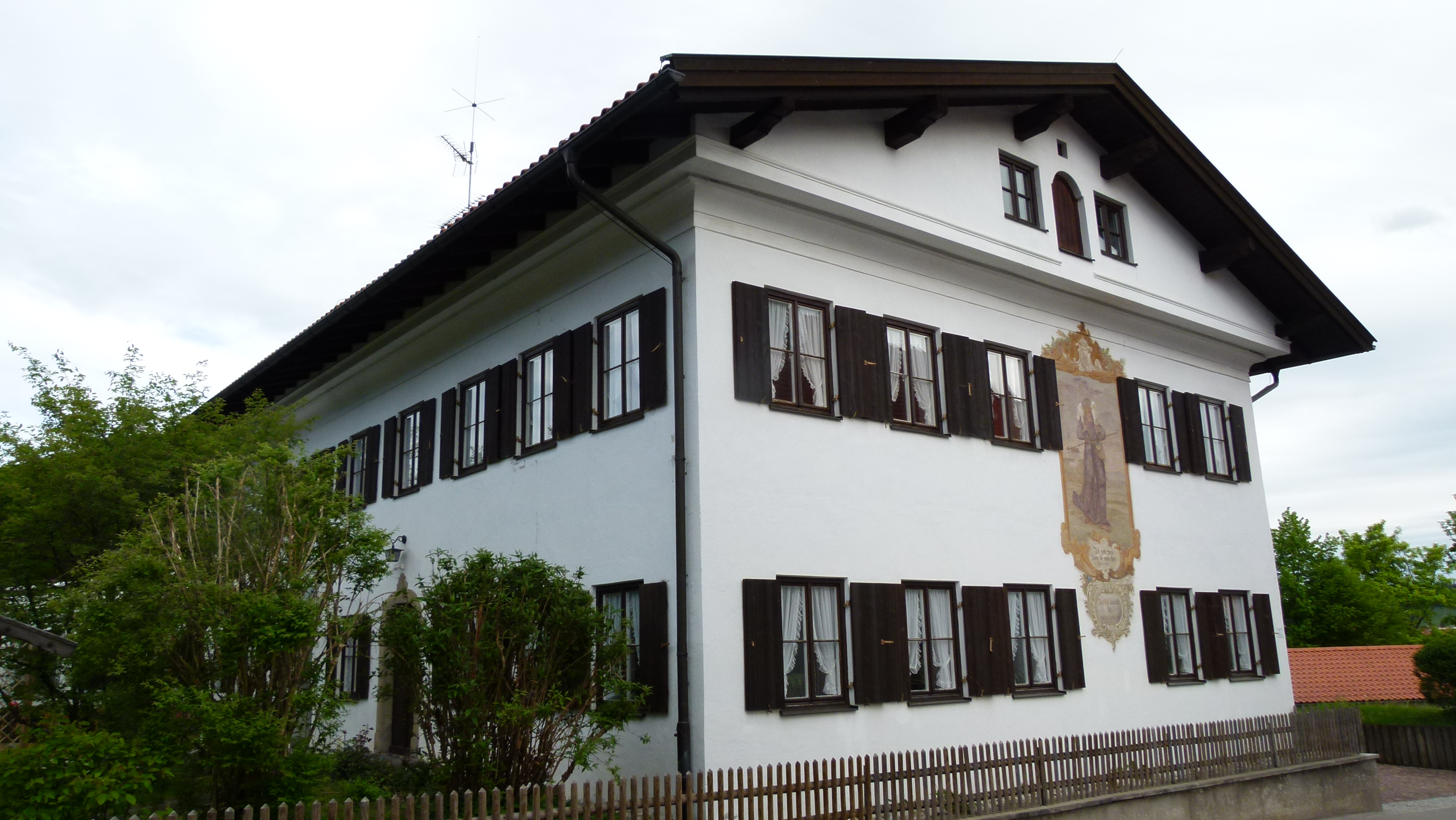 ehem. Pfarrhof in Pfronten-Berg, Kirchsteige 7